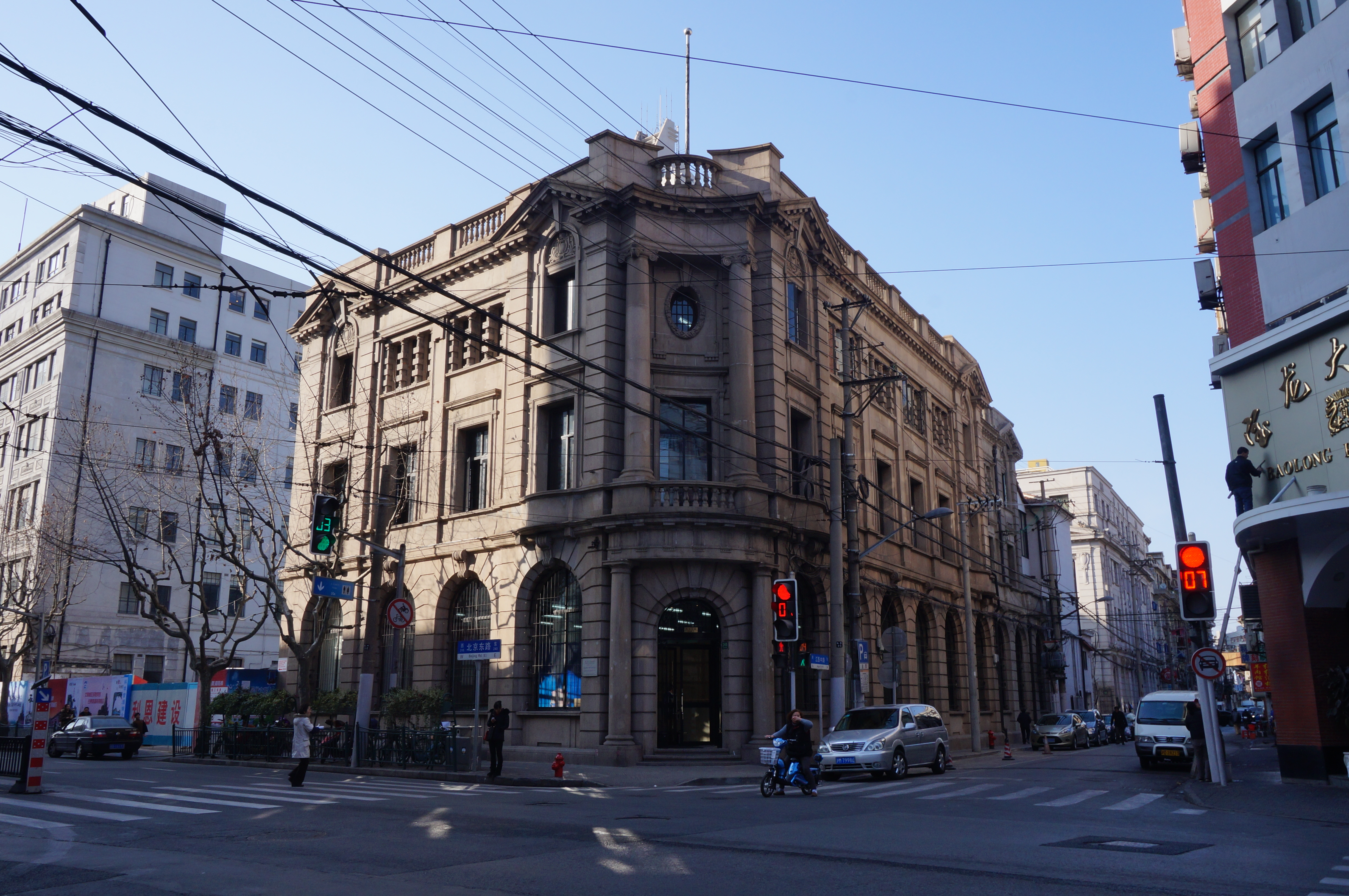 中文（中国大陆）: 上海第三批优秀历史建筑——四明银行大楼